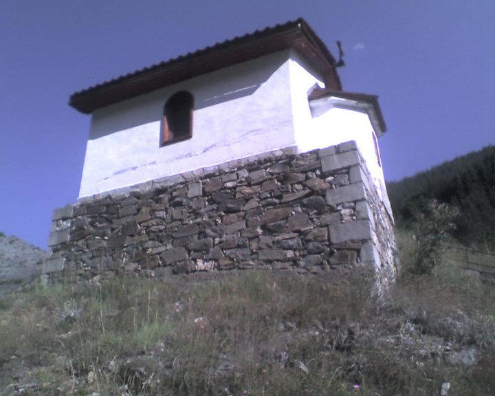 Chapel near village Zabardo